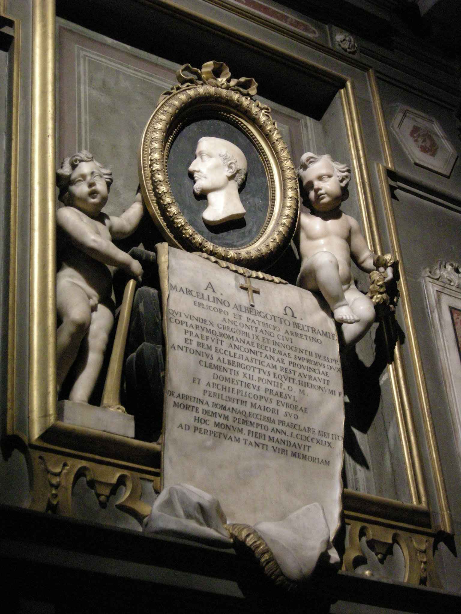 Cappella Tornaquinci, monumento a marcellino albergotti beltrami